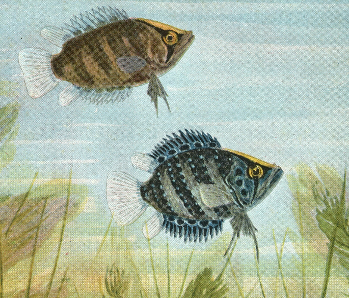 Polycentrus schomburgkii, Aquarell von Wilhelm Schreitmüller aus dem jahr 1924.